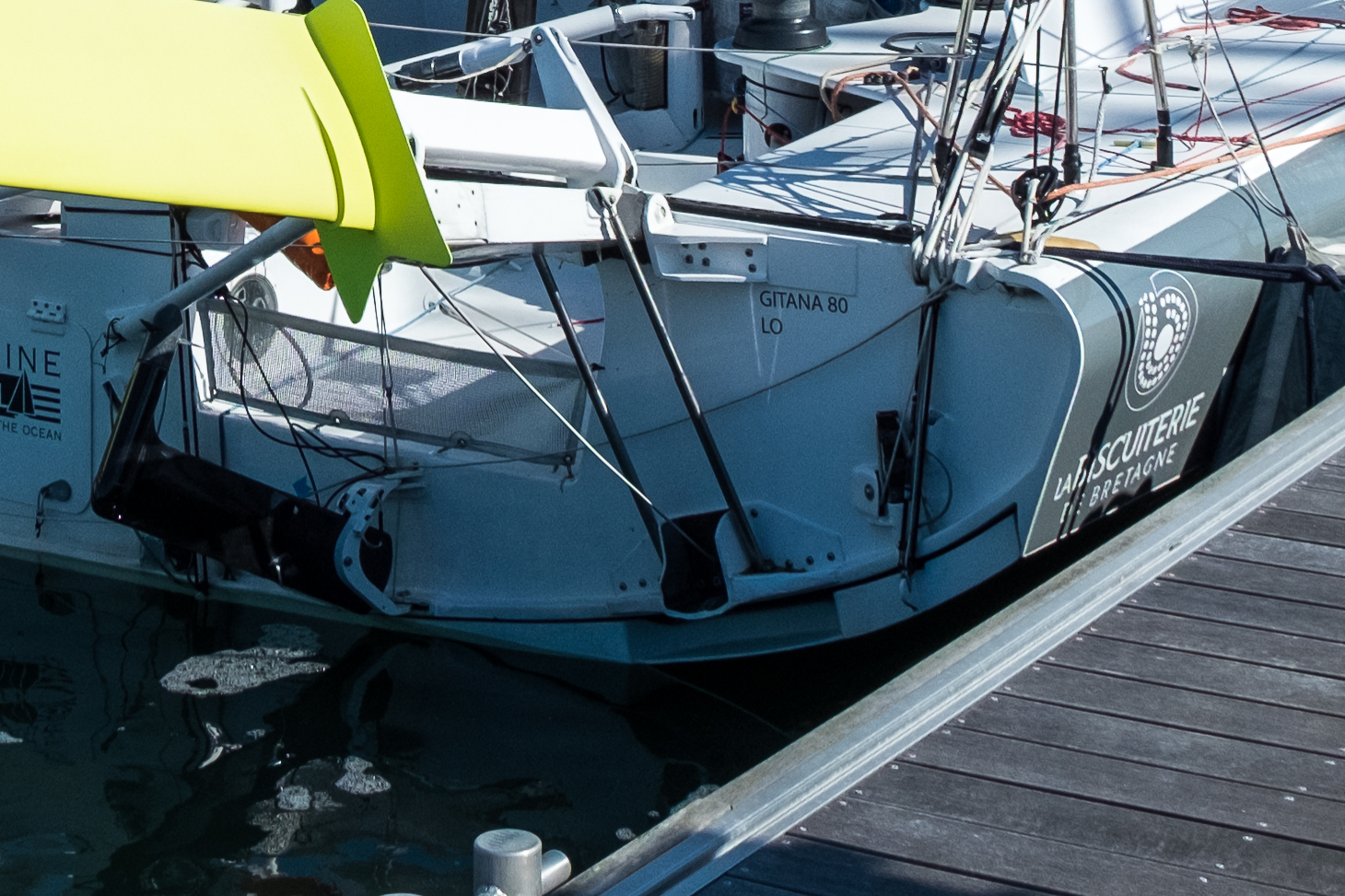 Trim-tab du 60 pieds IMOCA Newsrest-Matmut, ex-Gitana Eighty, ex-Synerciel, en septembre 2015 à Lorient.